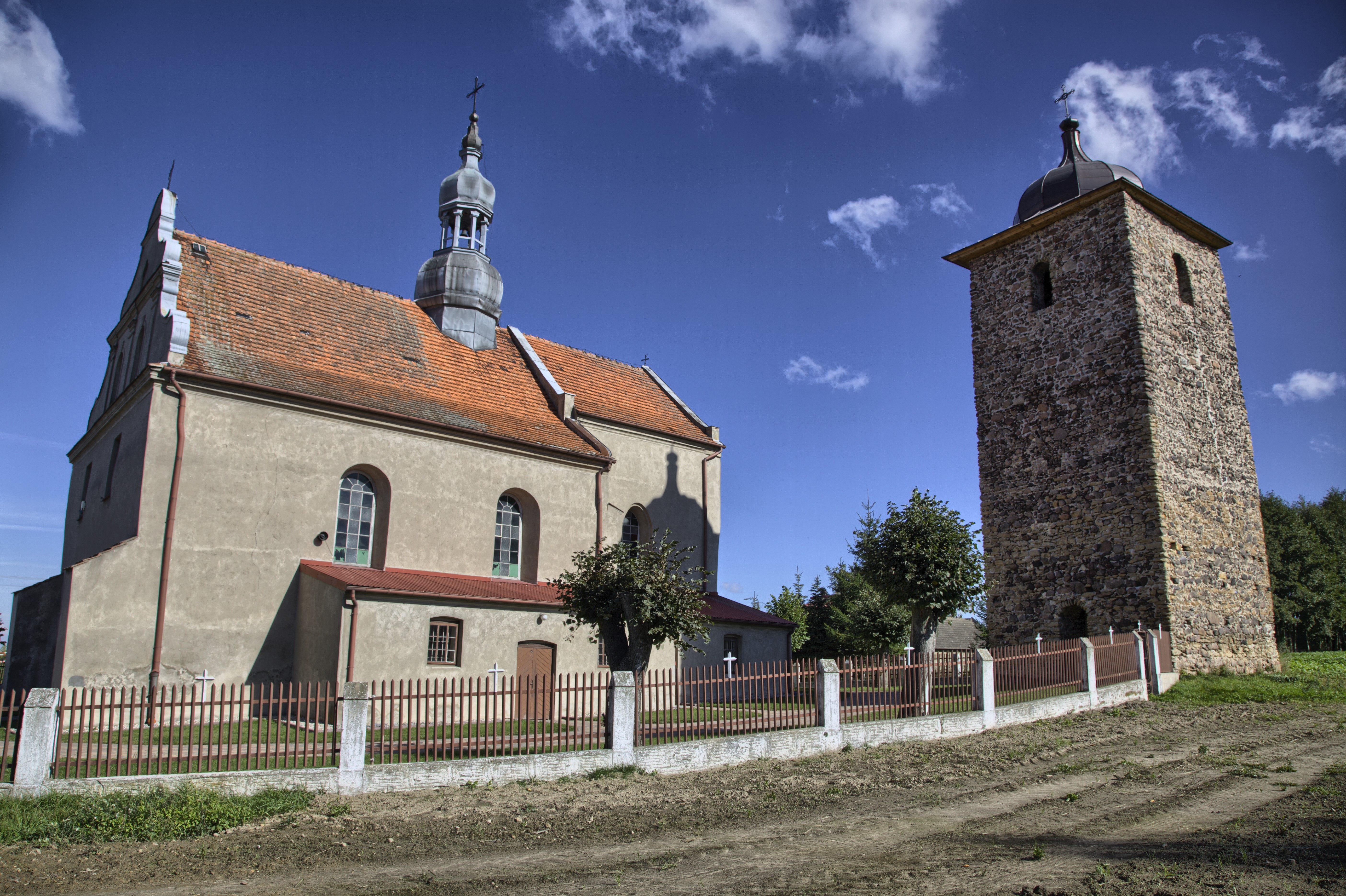 Krzyworzeka - kościół śś. Piotra i Pawła, XIII, XVIII